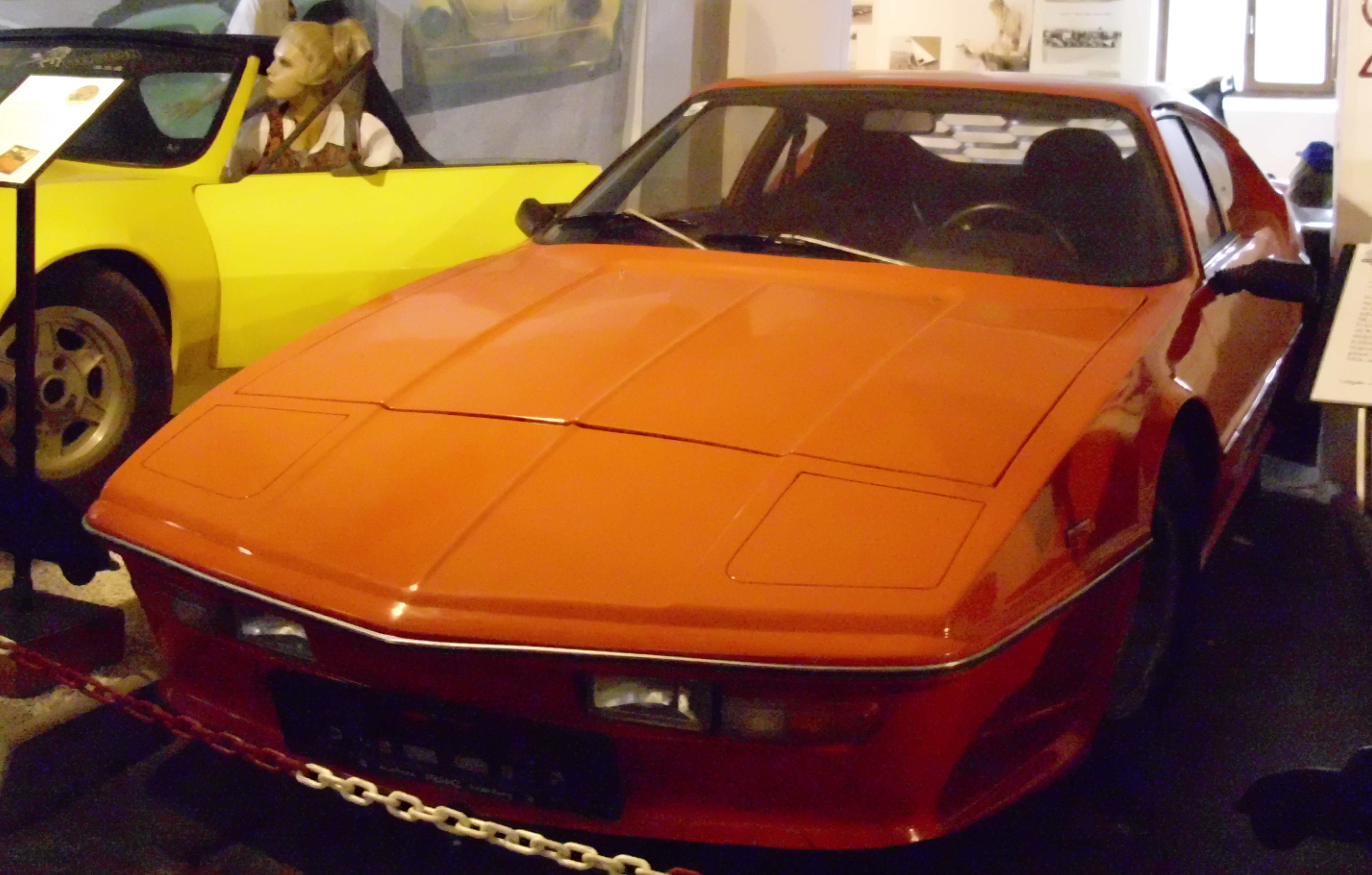 Custoca Taifun 1970–1986 im VW-Käfermuseum Gaal